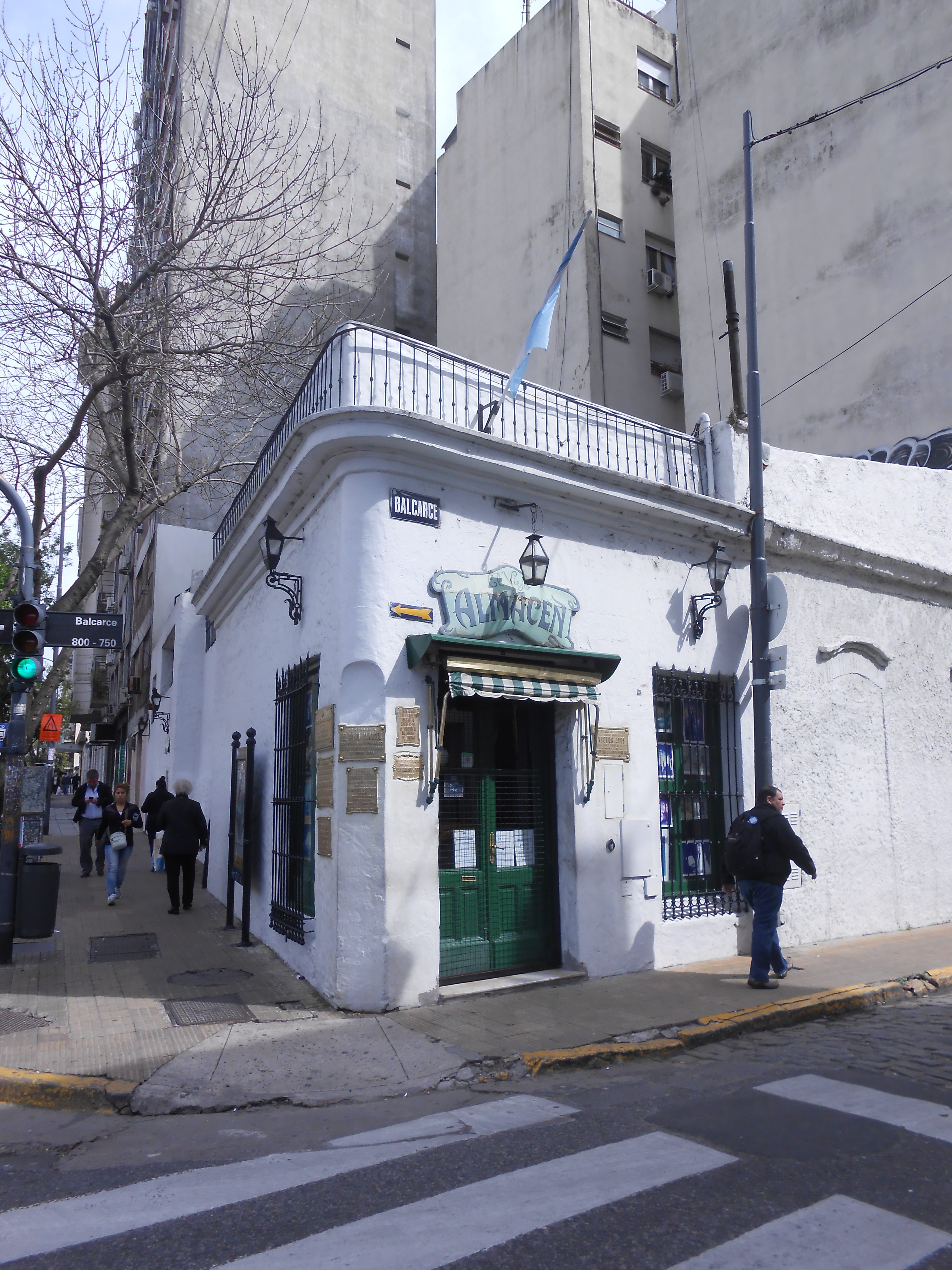 Antiguo almacén de San Telmo, se observa la inexistencia de ochava